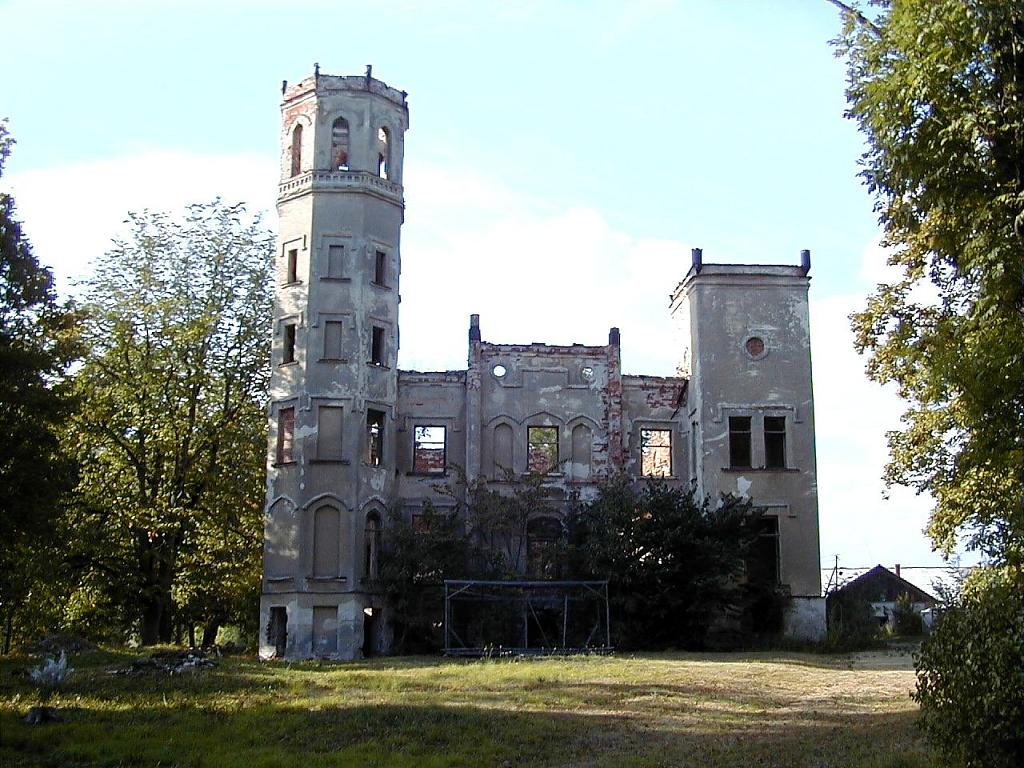 Lāzberģa pils drupas 2002-09-13